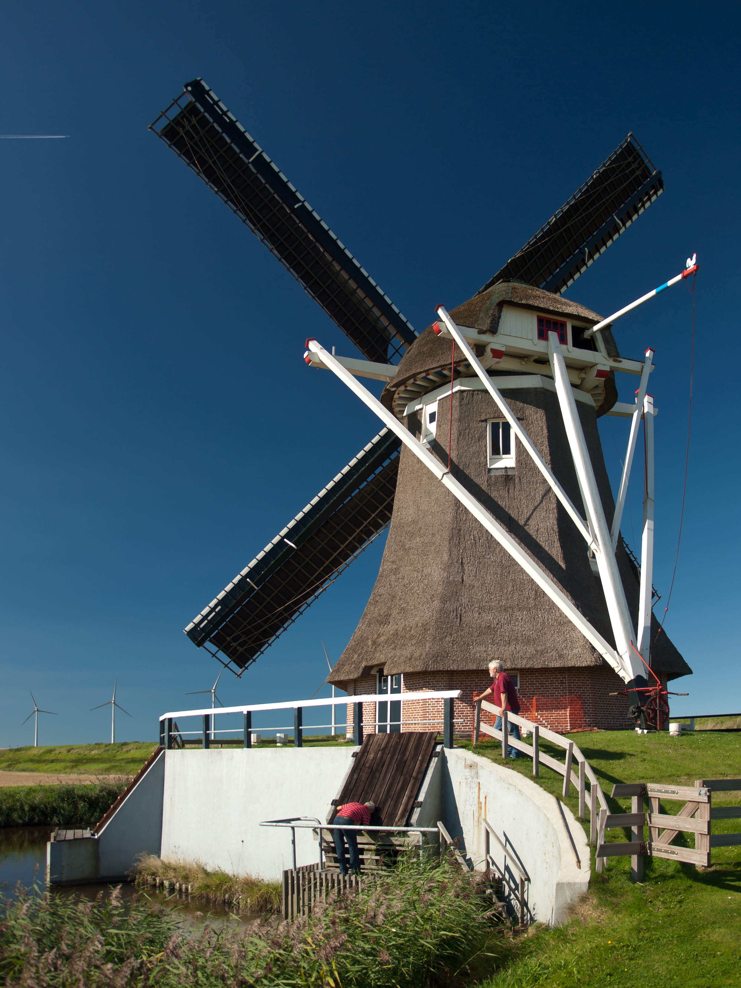 Polder molen de Goliath